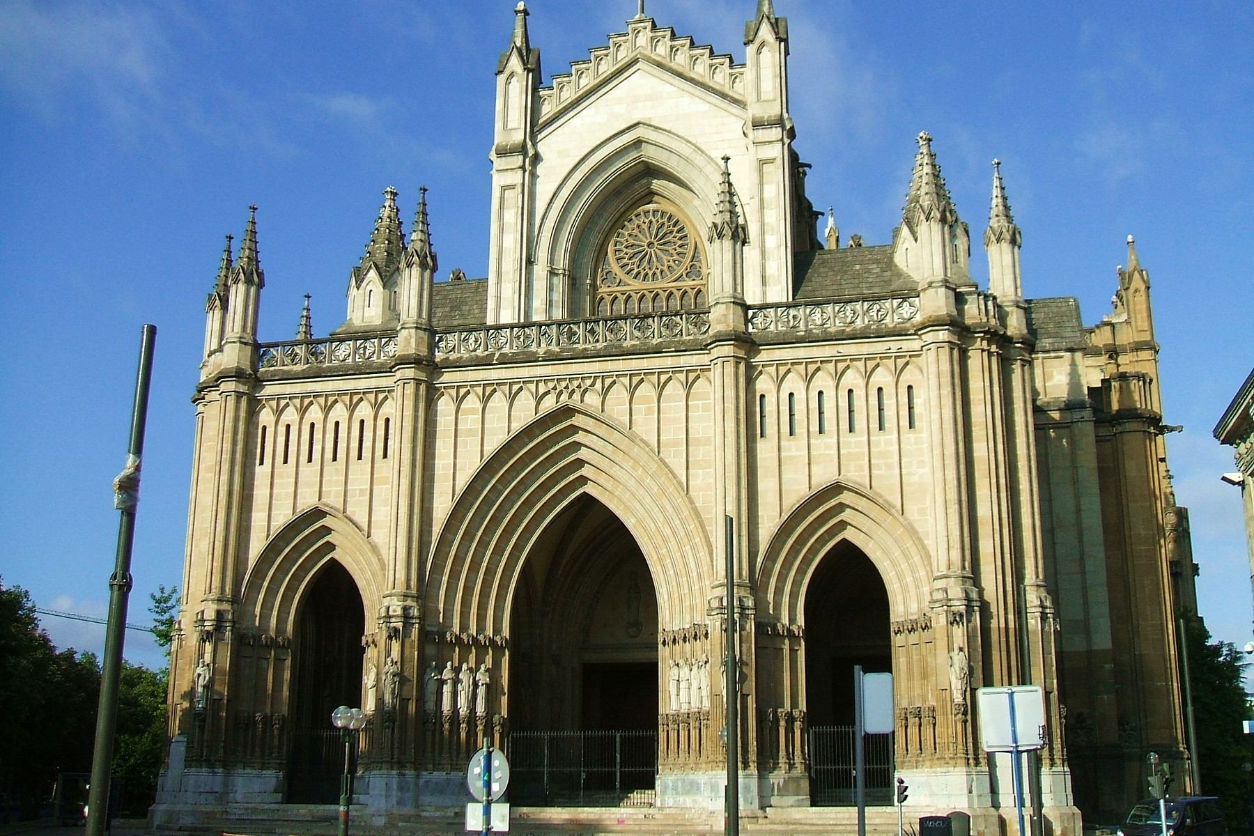 Fachada principal de la Catedral de María Inmaculada (Catedral Nueva) de Vitoria-Gasteiz, País Vasco, España